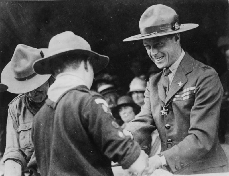 Der Prinz of Wales in Pfadfindertracht! Der Prinz of Wales beim Verteilen von Ehrenpreisen an englische Pfadfinder während einer Pfadfinder-Veranstaltung in London. Information added by Wikimedia users.Falsche Ortsangabe in der Bildbeschreibung, das Bild wurde beim en:3rd World Scout Jamboree in Birkenhead aufgenommen. Edward VIII of the United Kingdom